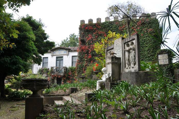 Amarante Travanca Casa de Acácio Lino Pintor